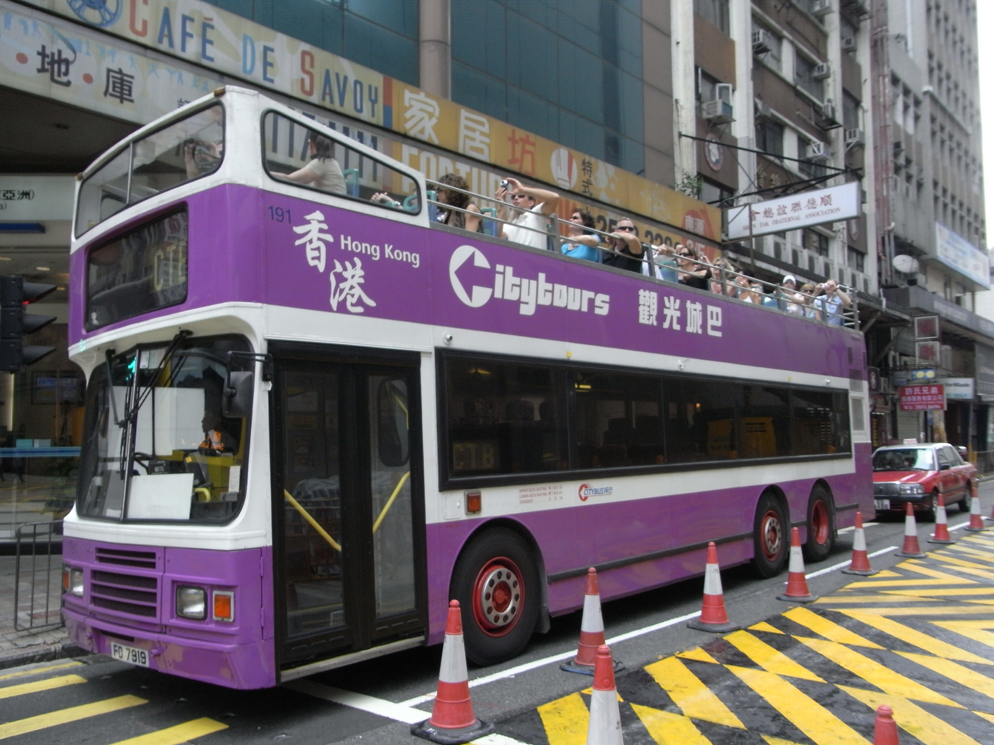 香港中環租庇利街 - 城巴開篷觀光巴士 [1]